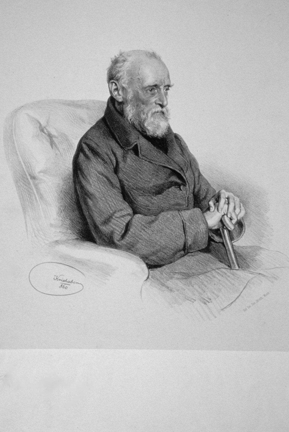 György Majláth Senior (1786-1861) ungarischer Staatsmann Lithographie von Josef Kriehuber, 1860